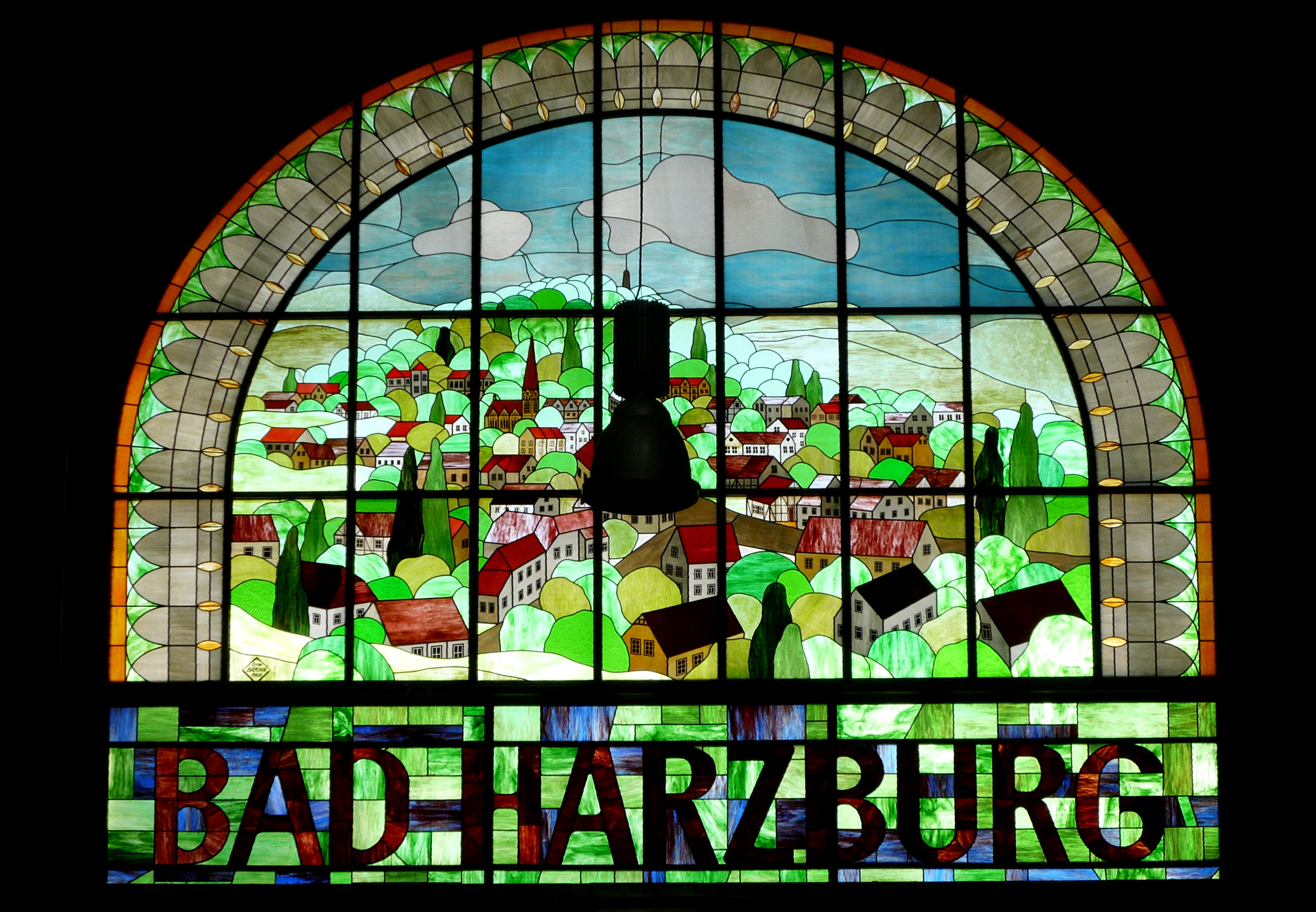 Bleiverglastes Fenster mit Darstellung des Kurortes Bad Harzburg. Ort: Eingangsbereich der Bahnhofshalle Bad Harzburg. Dieses Glasfenster stammt bereits aus der Zeit vor dem Weltkrieg II.